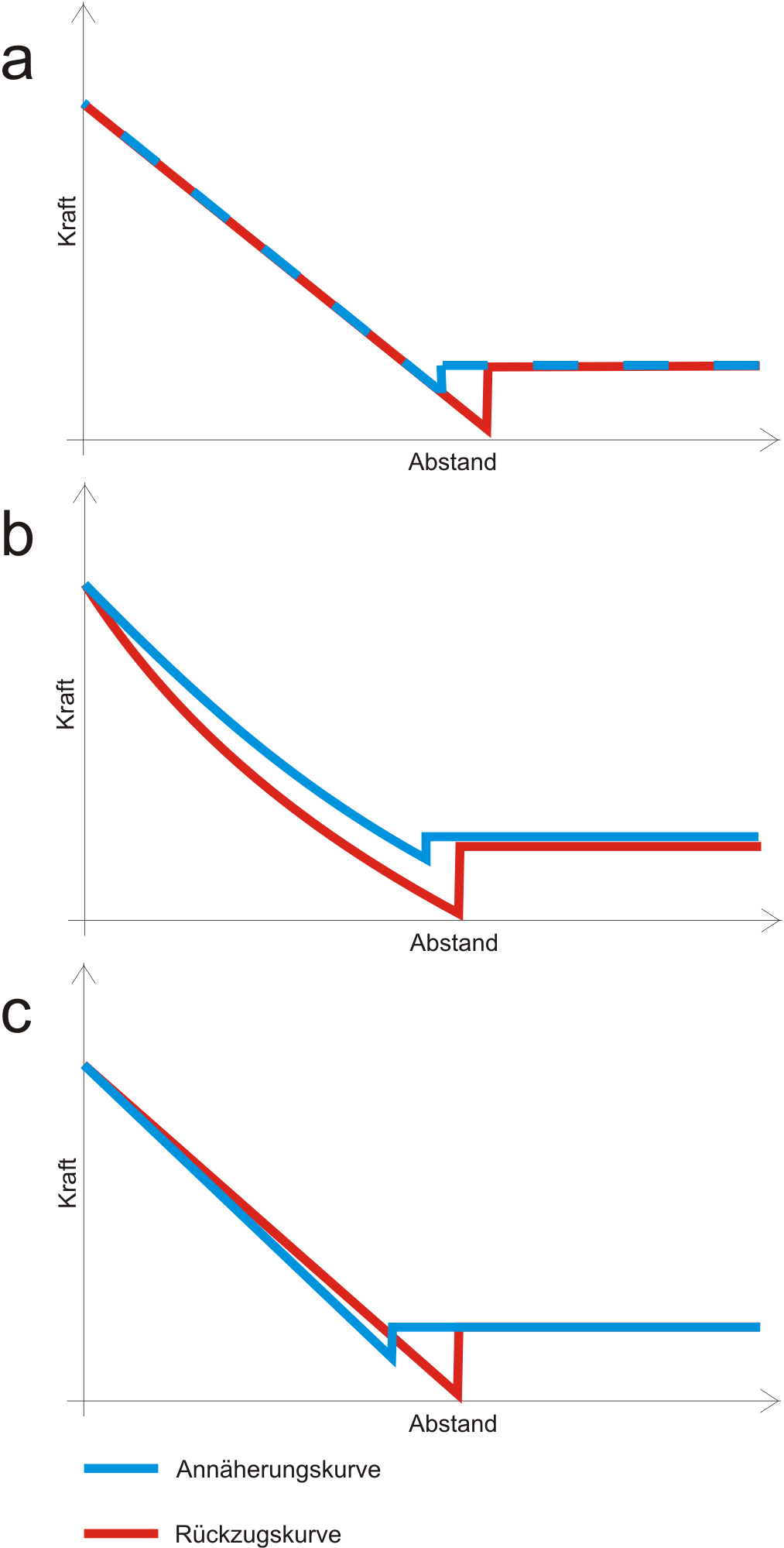 Grafik typischer Kraft-Abstandskurven die bei Messungen mit dem Rasterkraftmikroskop zustande kommen. Teilbild a stellt den Idealfall dar, b den Zustand bei dünnen oder elastoplastischen Proben, c das häufigste Artefakt.